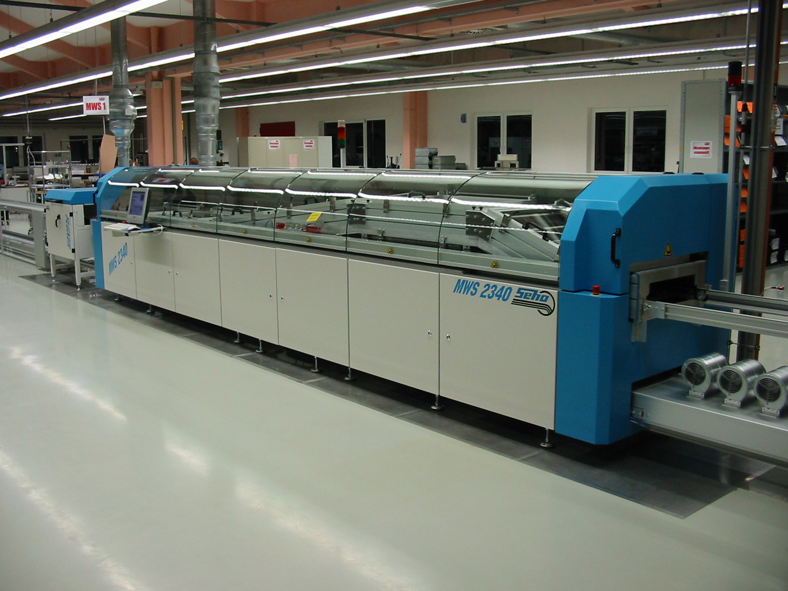 Wellenlötmaschine Seho MWS 2340